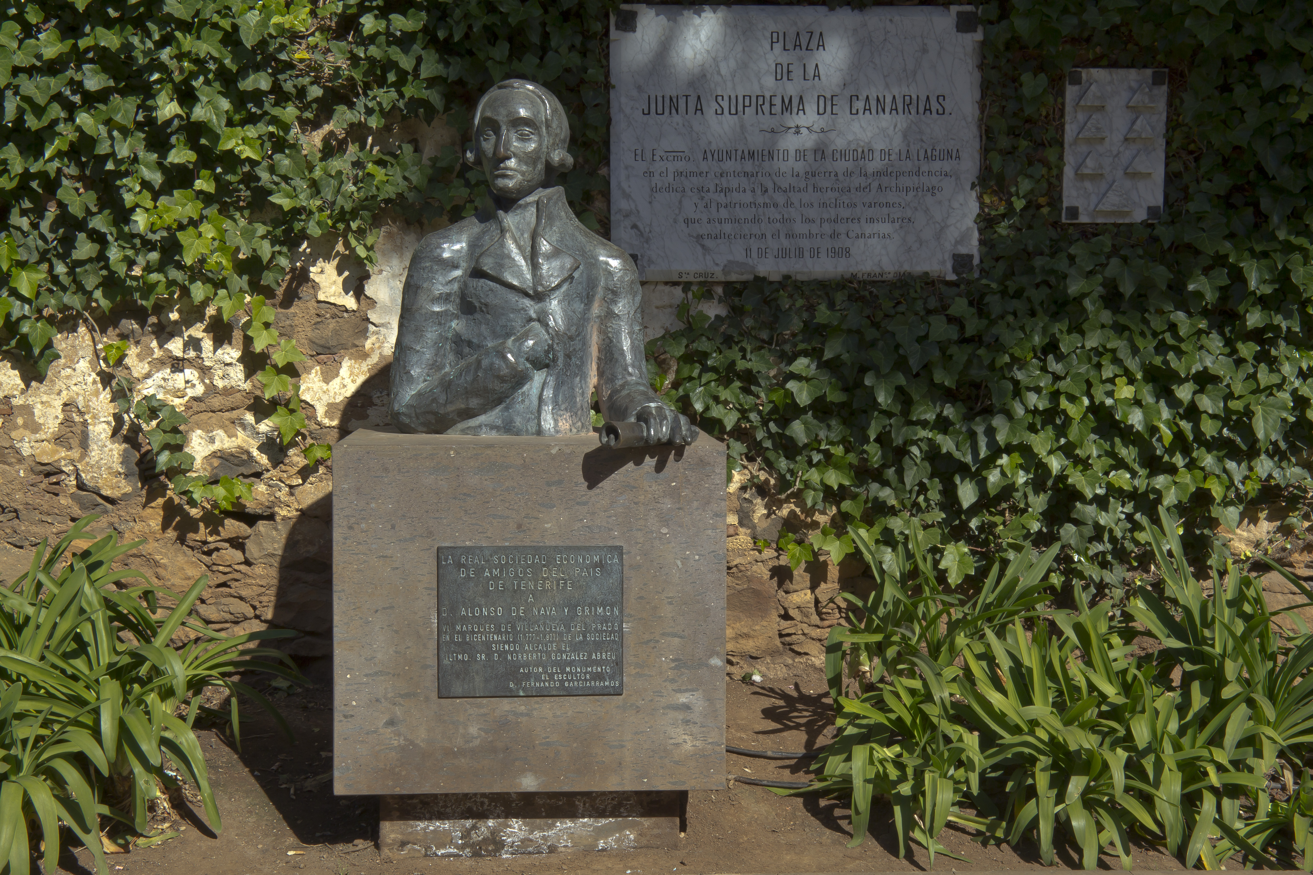 Alonso de Nava y Grimón. Monumento conmemorativo en la Plaza de la Junta Suprema de Canarias, San Cristóbal de la Laguna, Tenerife, España